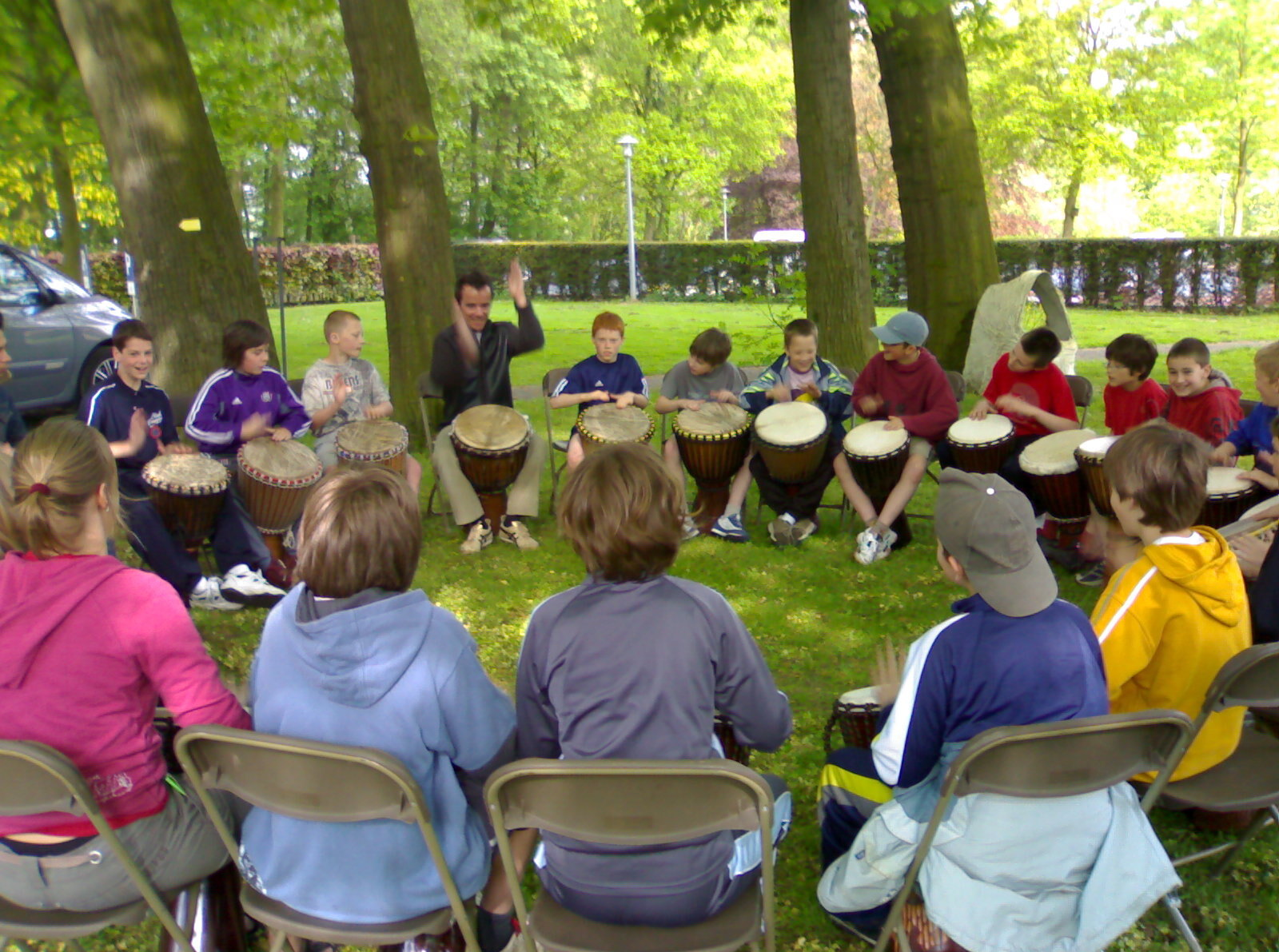 Djembé